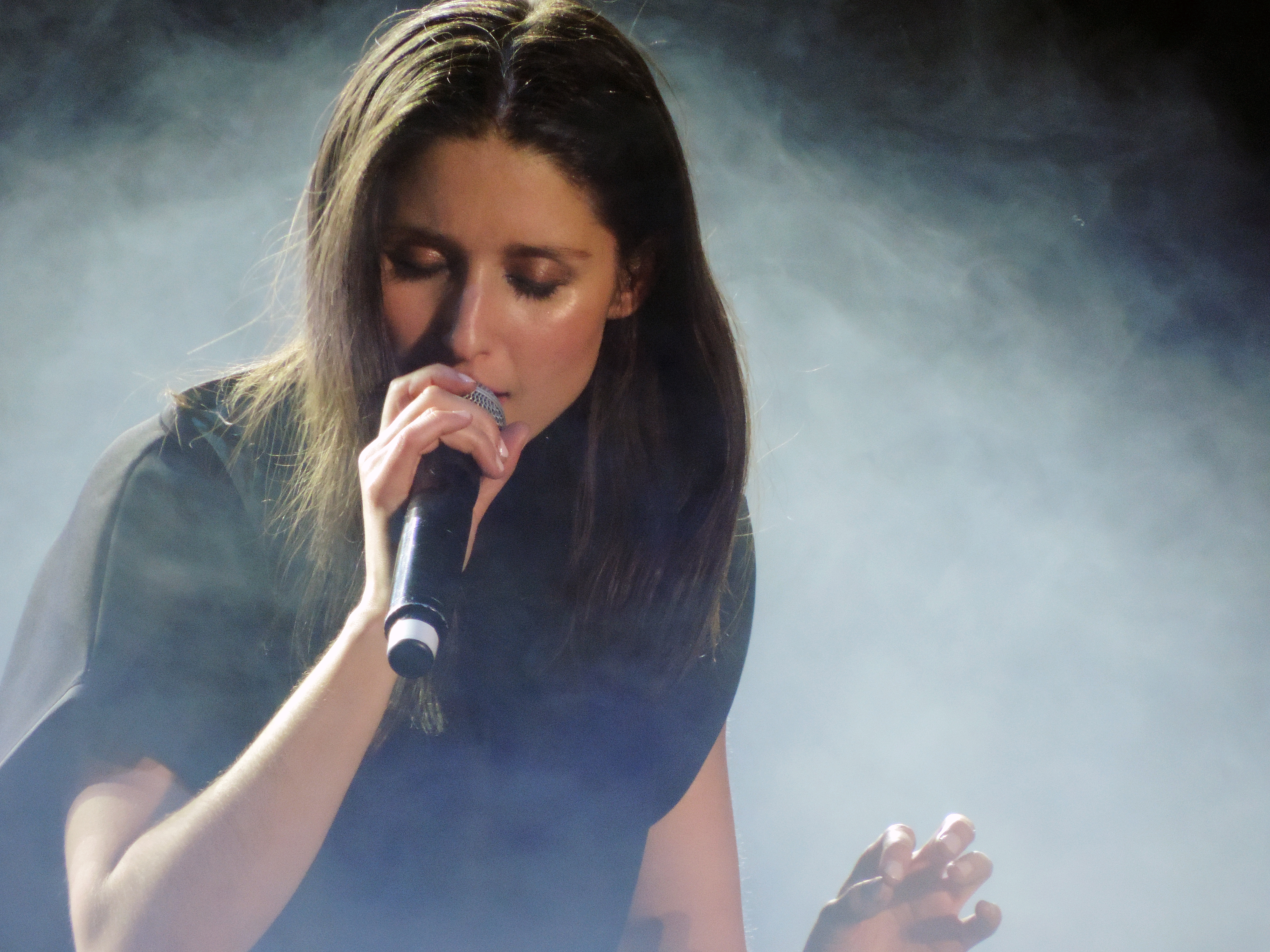 Chilean pop singer Francisca Valenzuela on stage at a full capacity SurActivo Events Center. La cantante chilena Francisca Valenzuela sobre el escenario en un Centro de Eventos SurActivo colmado de público. Hualpén, Concepción, Chile. October 30th, 2014.